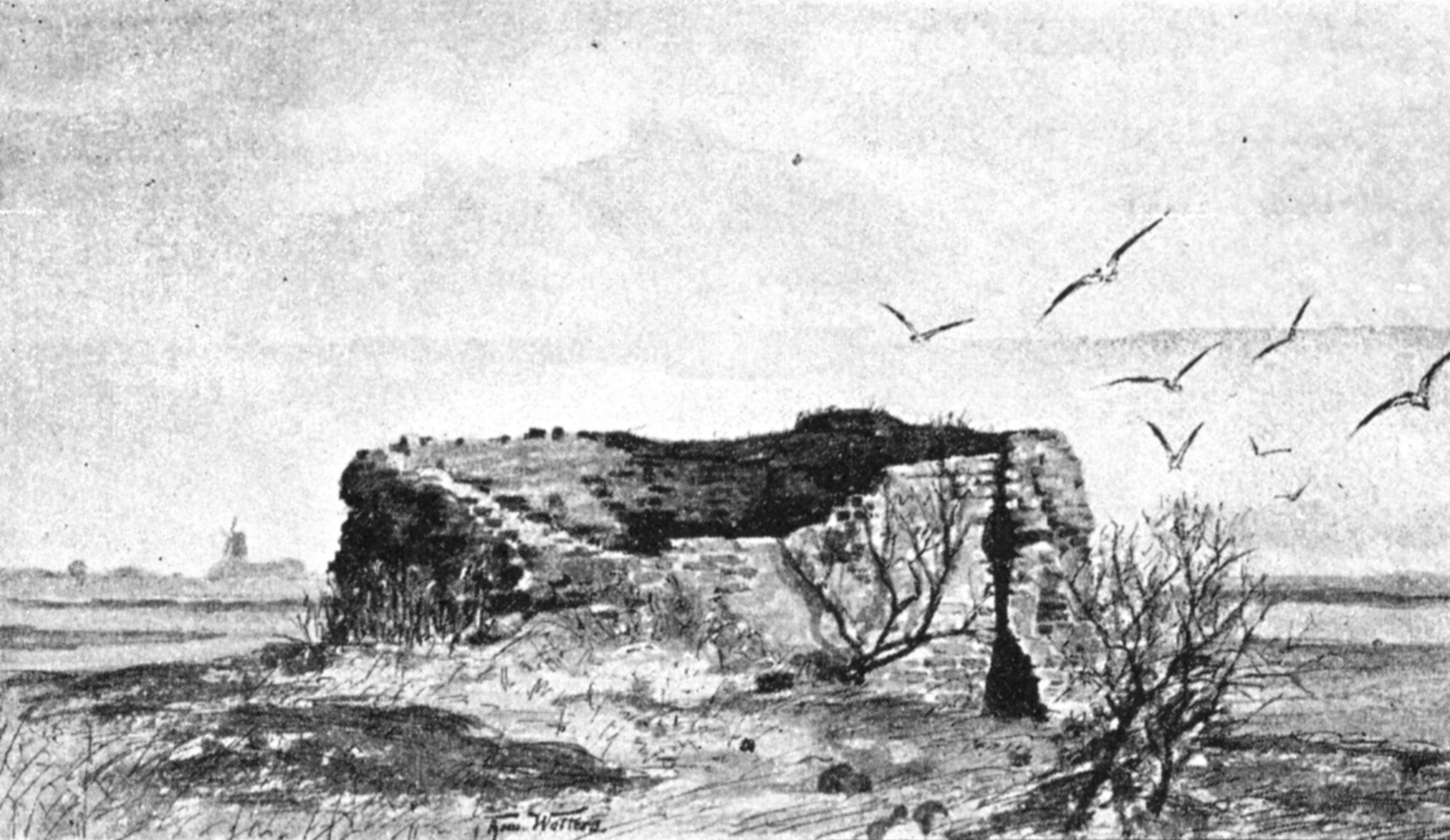 Ruine der Burg Glambek, von Thomas Wolters